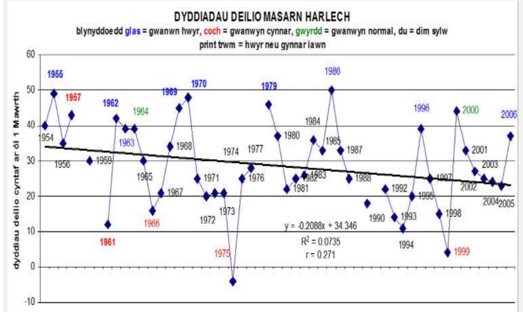 Graff yn dangos cyfres hir (1954-2006) o ddyddiadau “deilio cyntaf” un fasarnen yng ngwaelodion Harlech gan ALlJ.